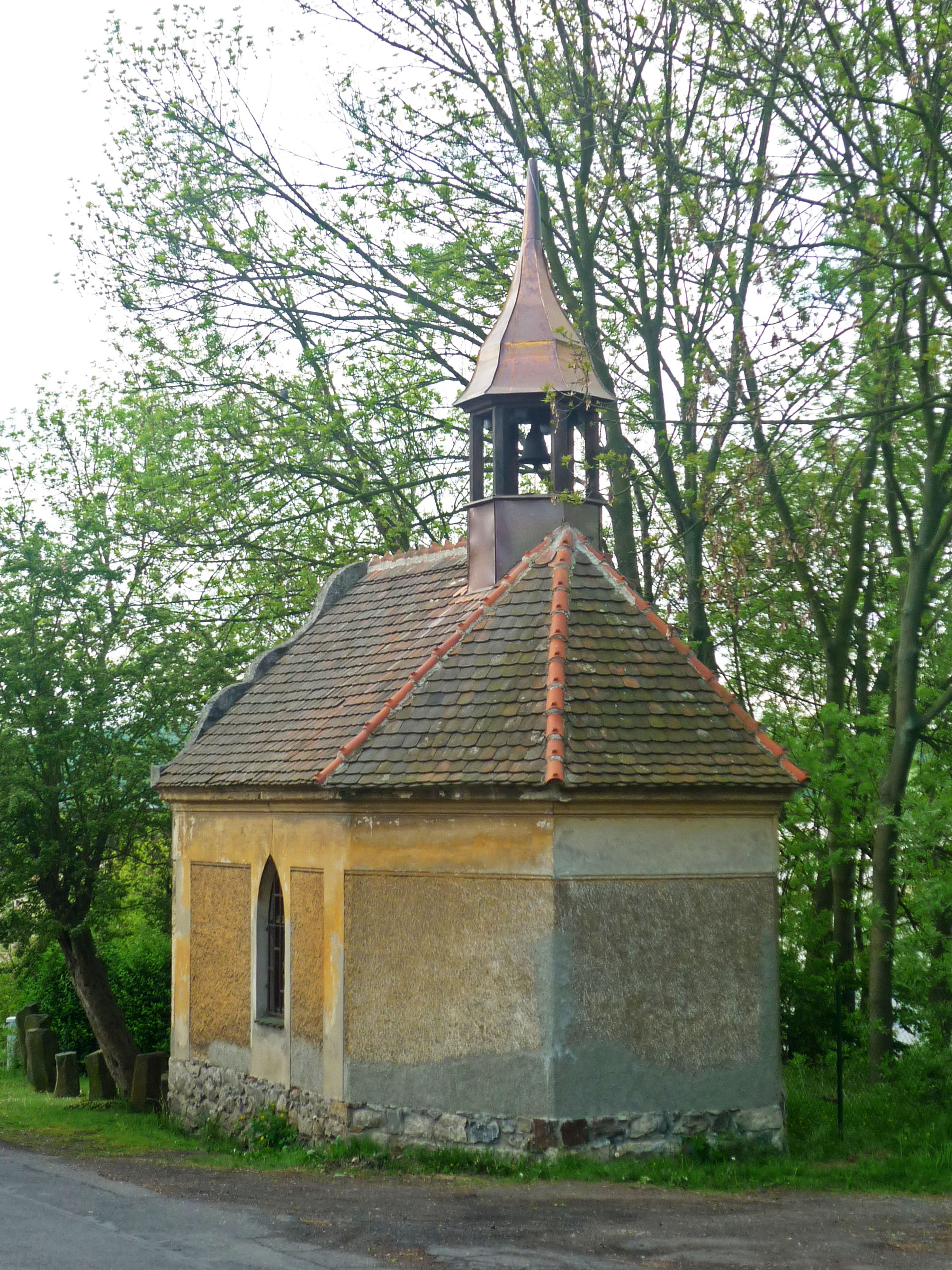 Kapelle bei Aussig (Ústí nad Labem) im OT Habrovice (Johnsdorf)